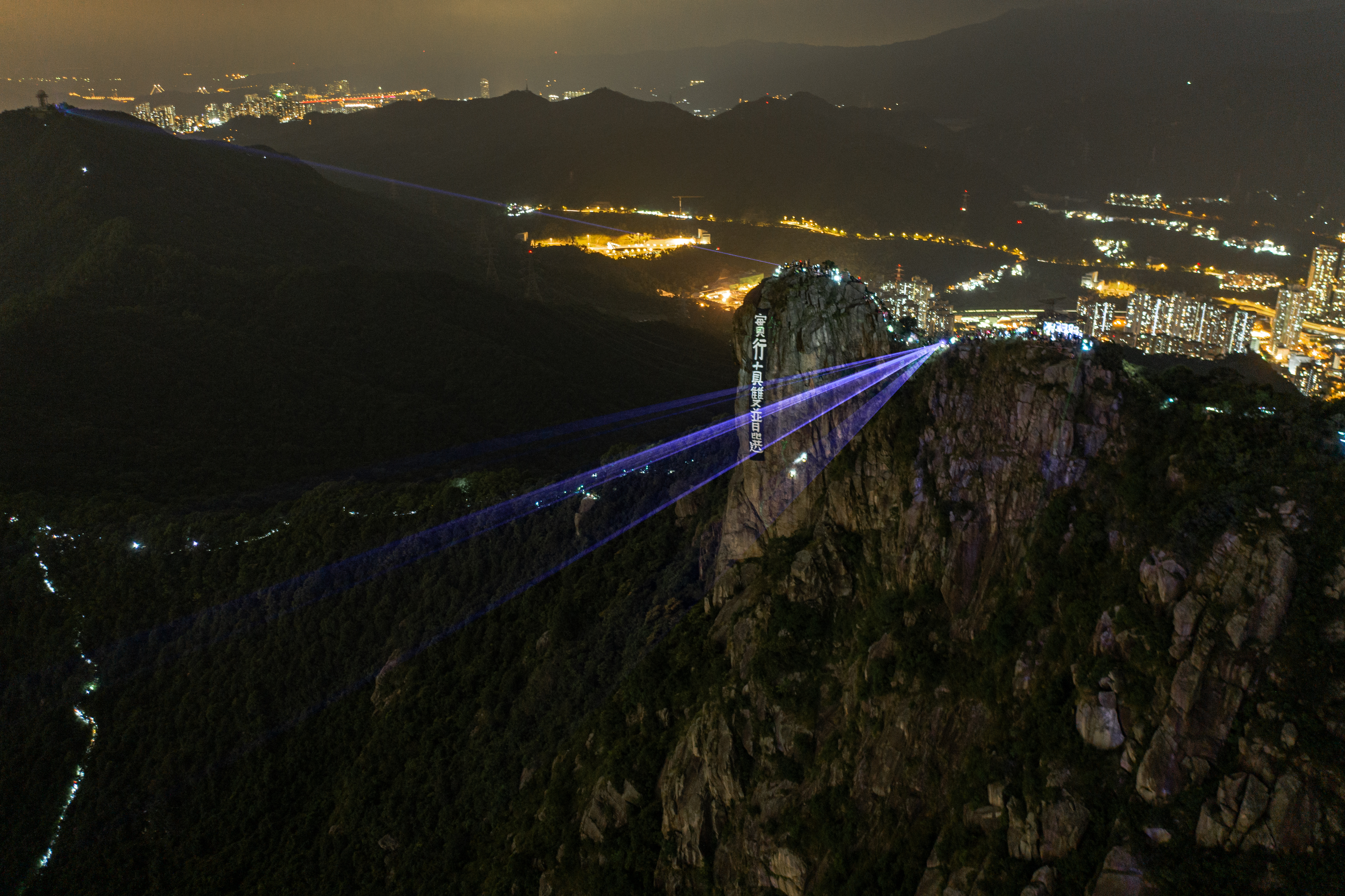 2019-09-13 Lion Rock, Hong Kong